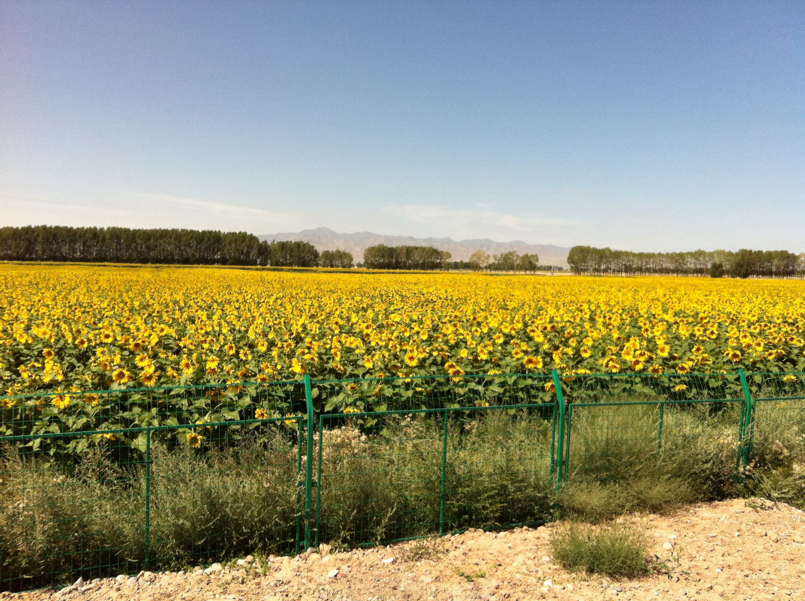 Yongchang, Jinchang, Gansu, China